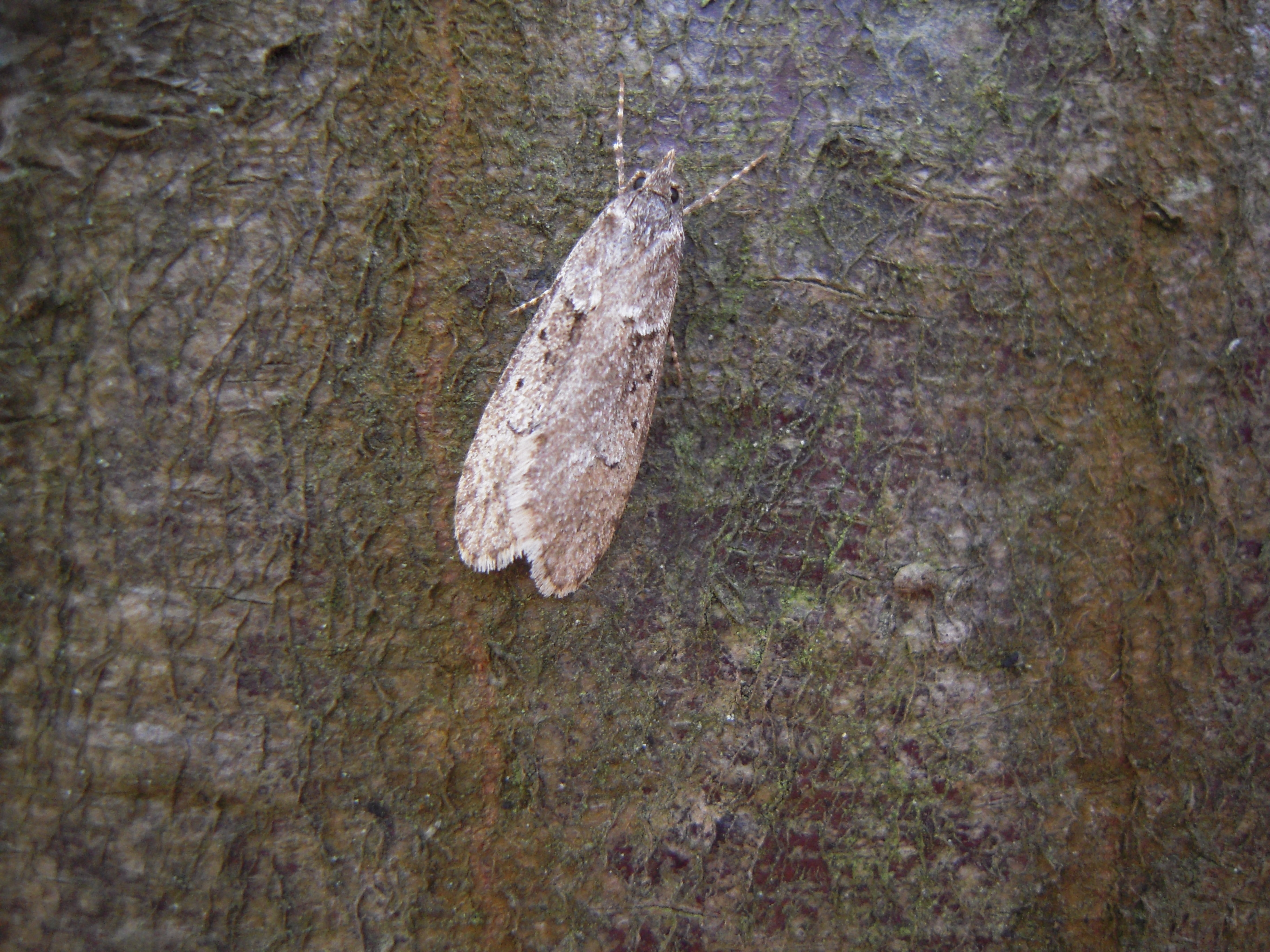 Diurna fagella sur tronc de hêtre (Moselle Lorraine Fr.)